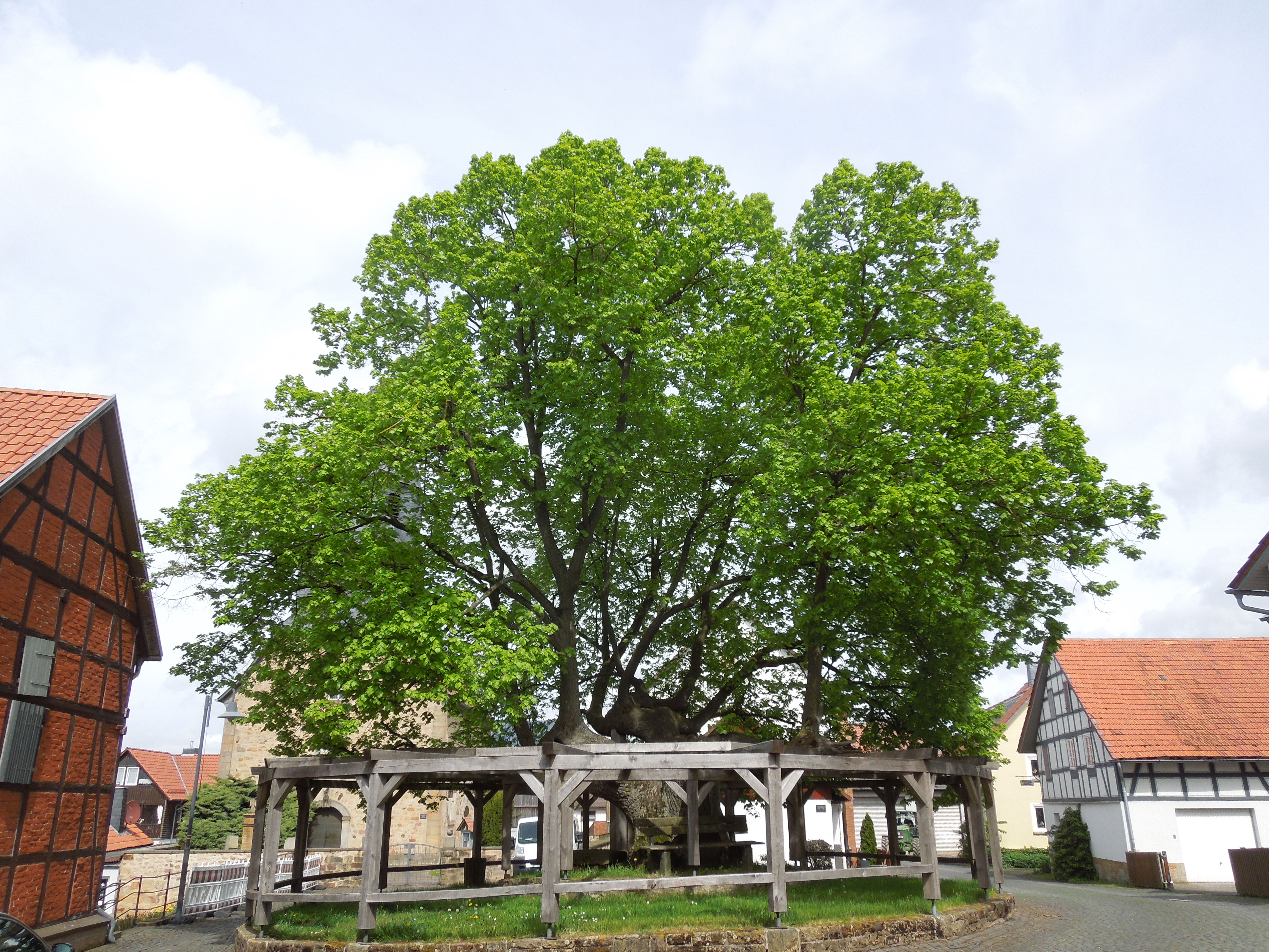 Die geleitete Dorflinde in Sebbeterode